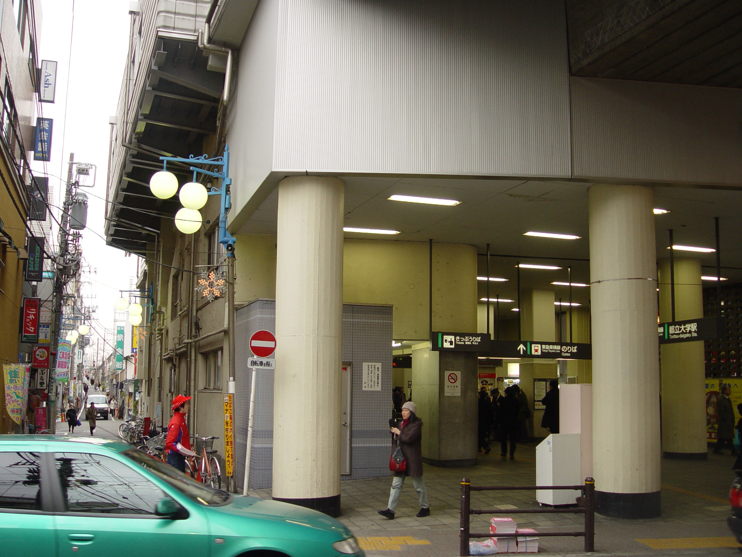 Toritsudaigaku Station, Tokyo, Japan都立大学駅